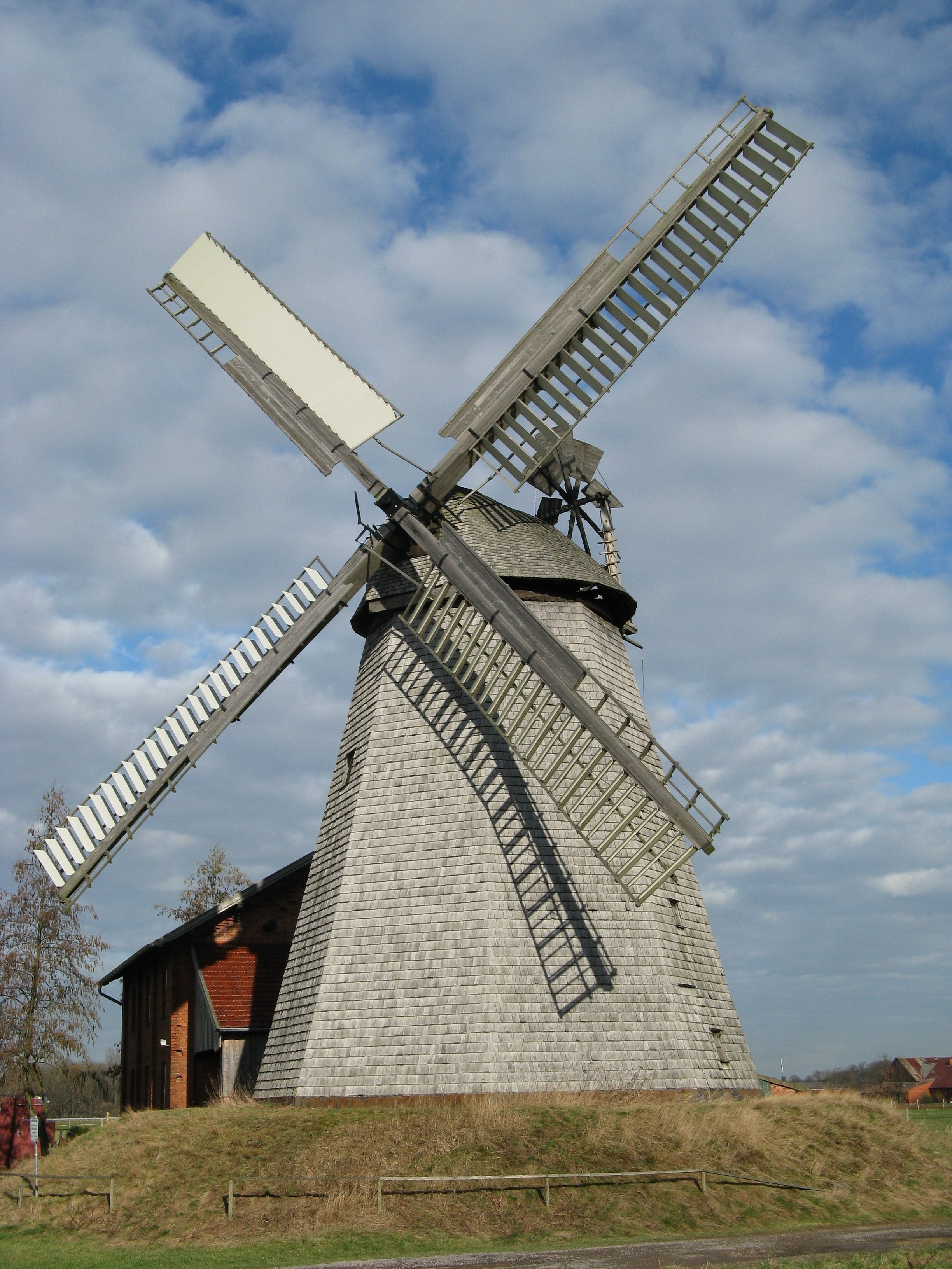 Windmühle Bierde (Petershagen)